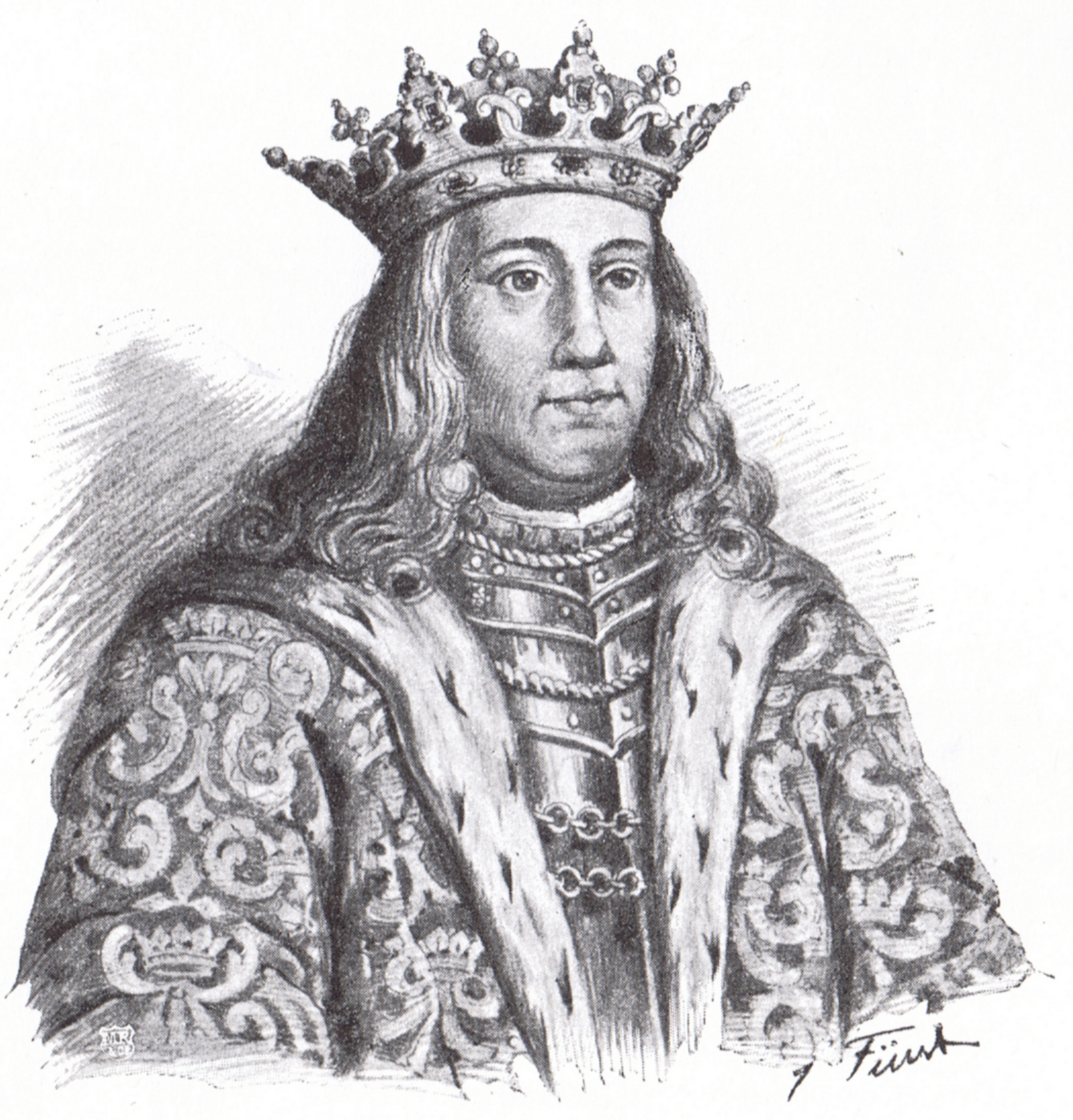 Christian I., König von Dänemark, Norwegen und Schweden. Zeichnung von Julius Fürst um 1895.